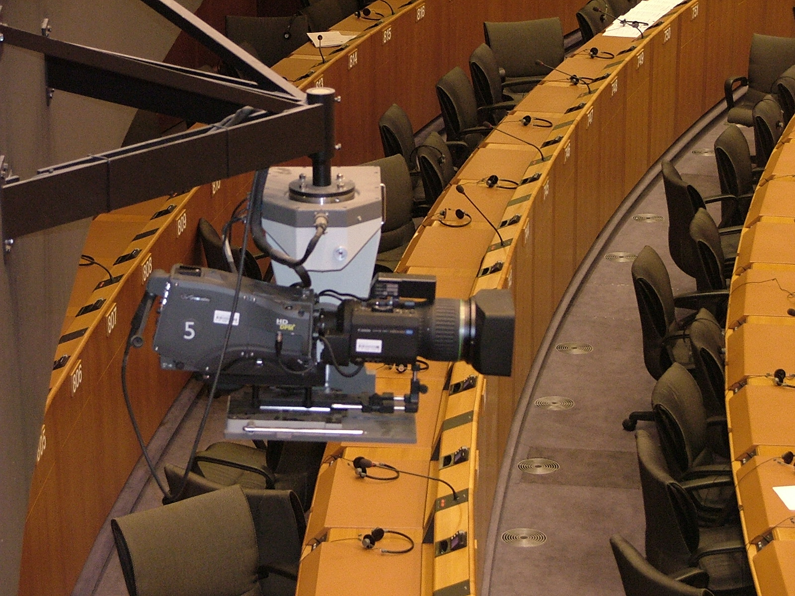 Belgium, Bruxelles - Brussel, European Parliament Pl: Belgia, Bruksela, Parlament Europejski